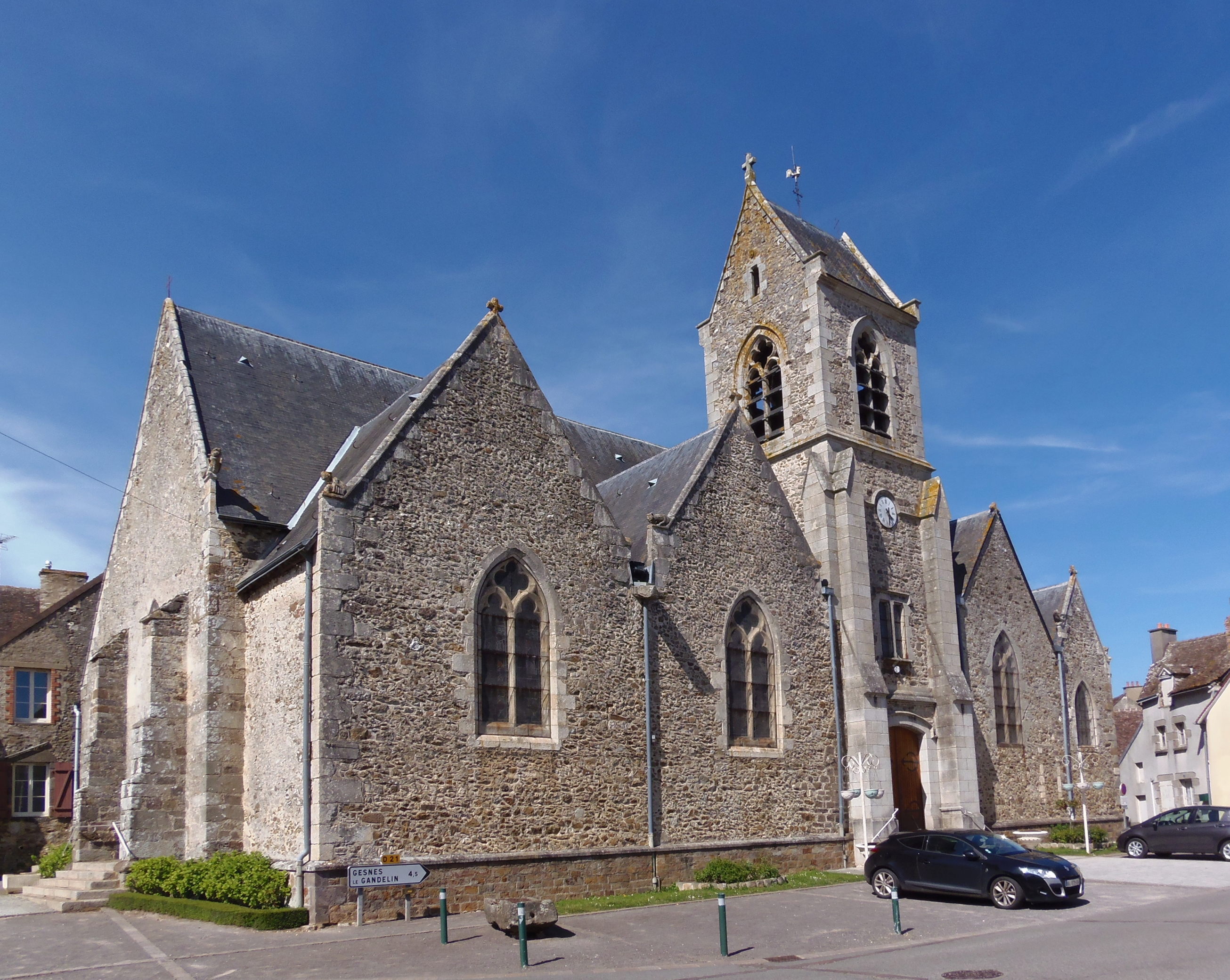 Assé-le-Boisne (Pays de la Loire, France). L'église Notre-Dame.